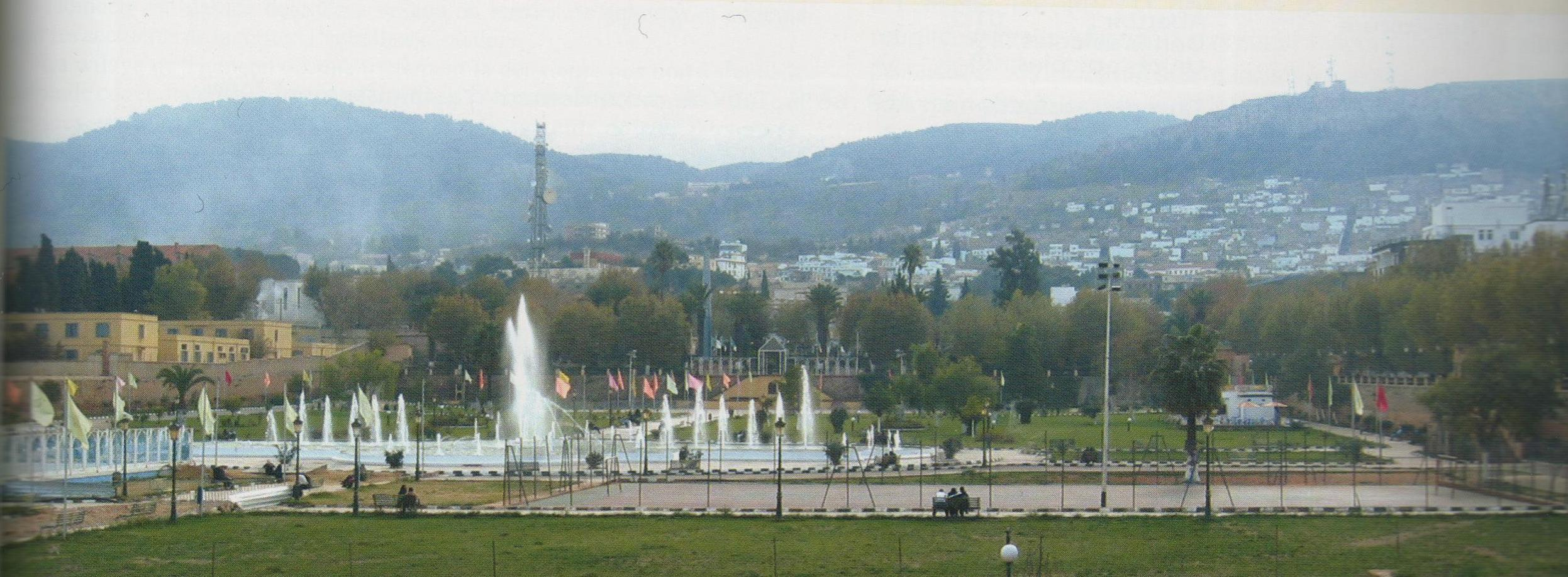 grand bassin tlemcen